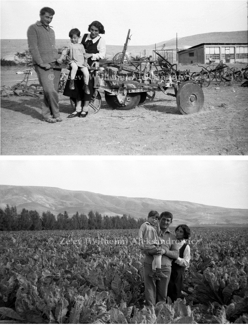 קיבוץ בית זרע 1933